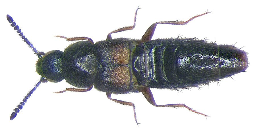 Familie: Staphylinidae Grösse: 1,5-1,9 mm Verbreitung: Mittelmeergebiet, Afrika Fundort: Senegal, M`Bour leg. U.Schmidt, 1991; det. R.Pace, 2007 Foto: U.Schmidt, 2008